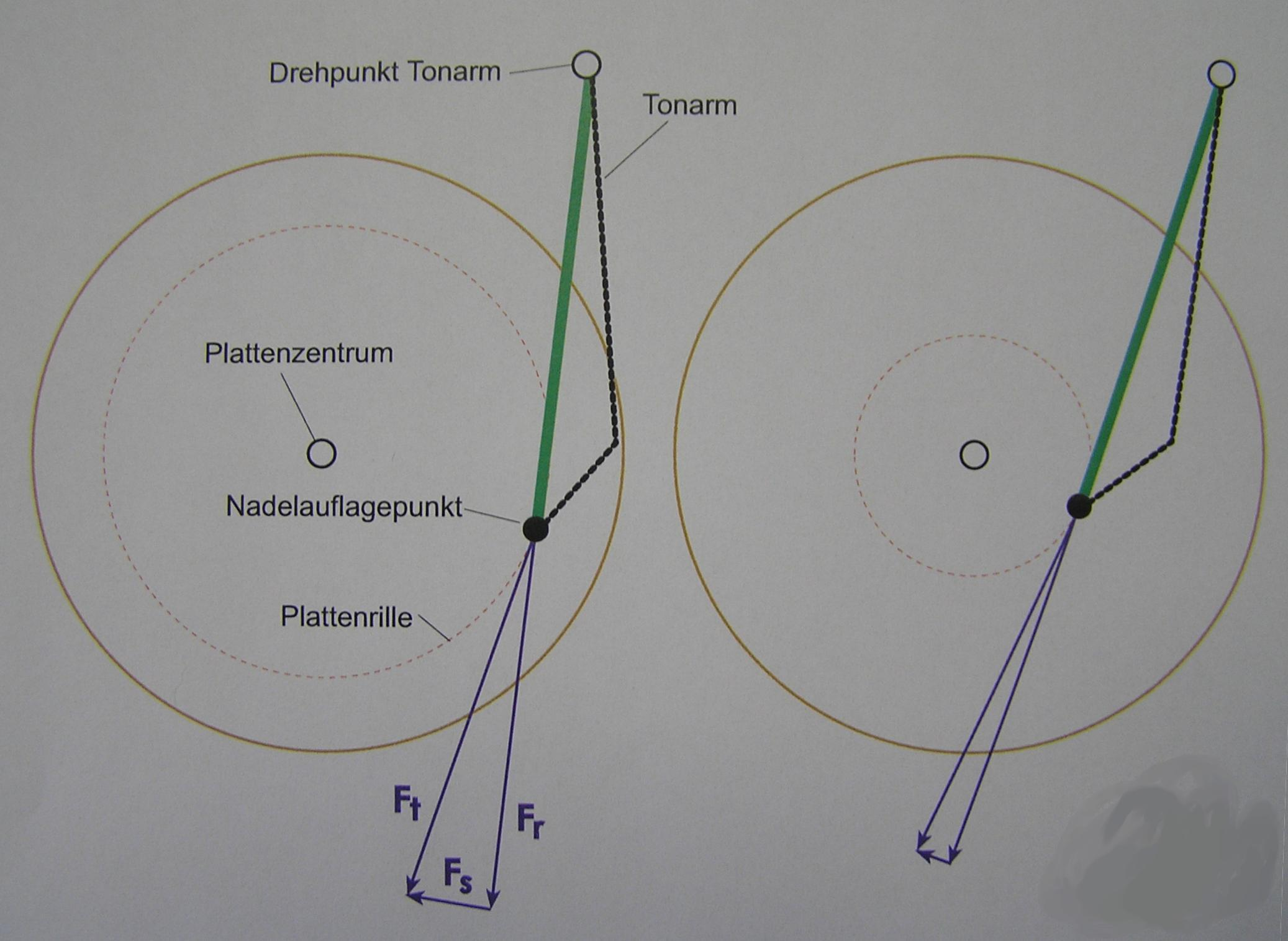 Beschreibung: Kräfteverteilung beim Skating-Effekt Quelle: Selbst gezeichnet 2007/01 Ersteller: Dieter Stotz